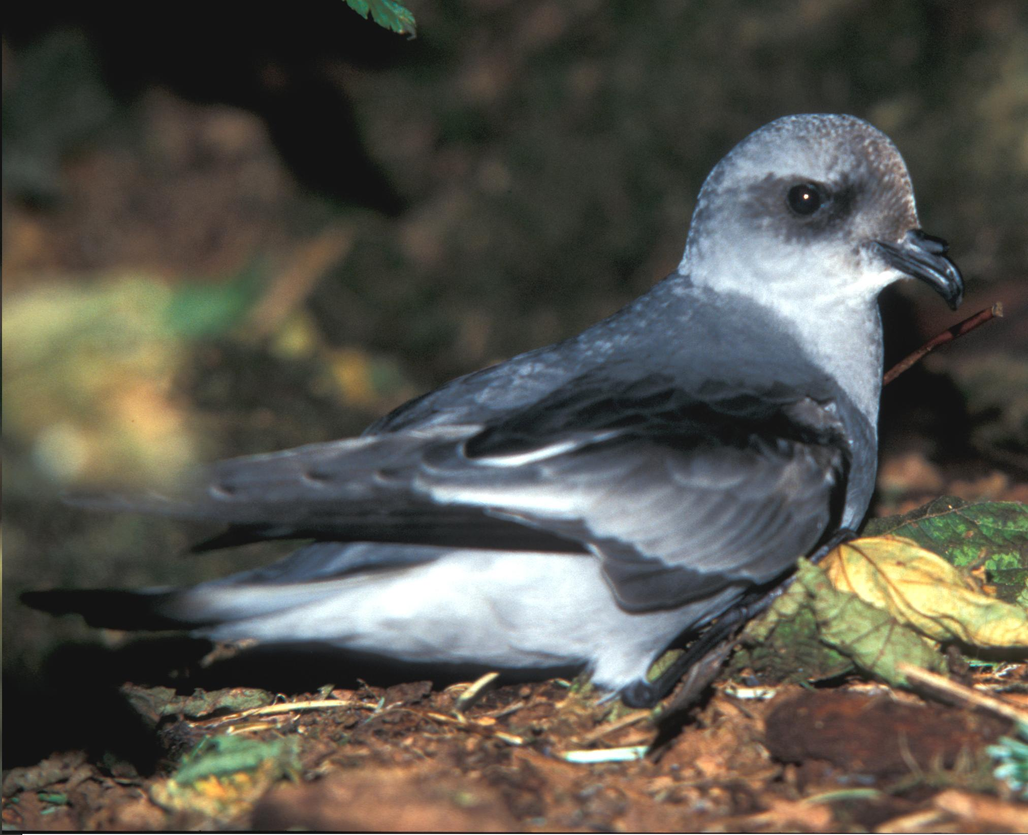 Océanite à queue fourchue